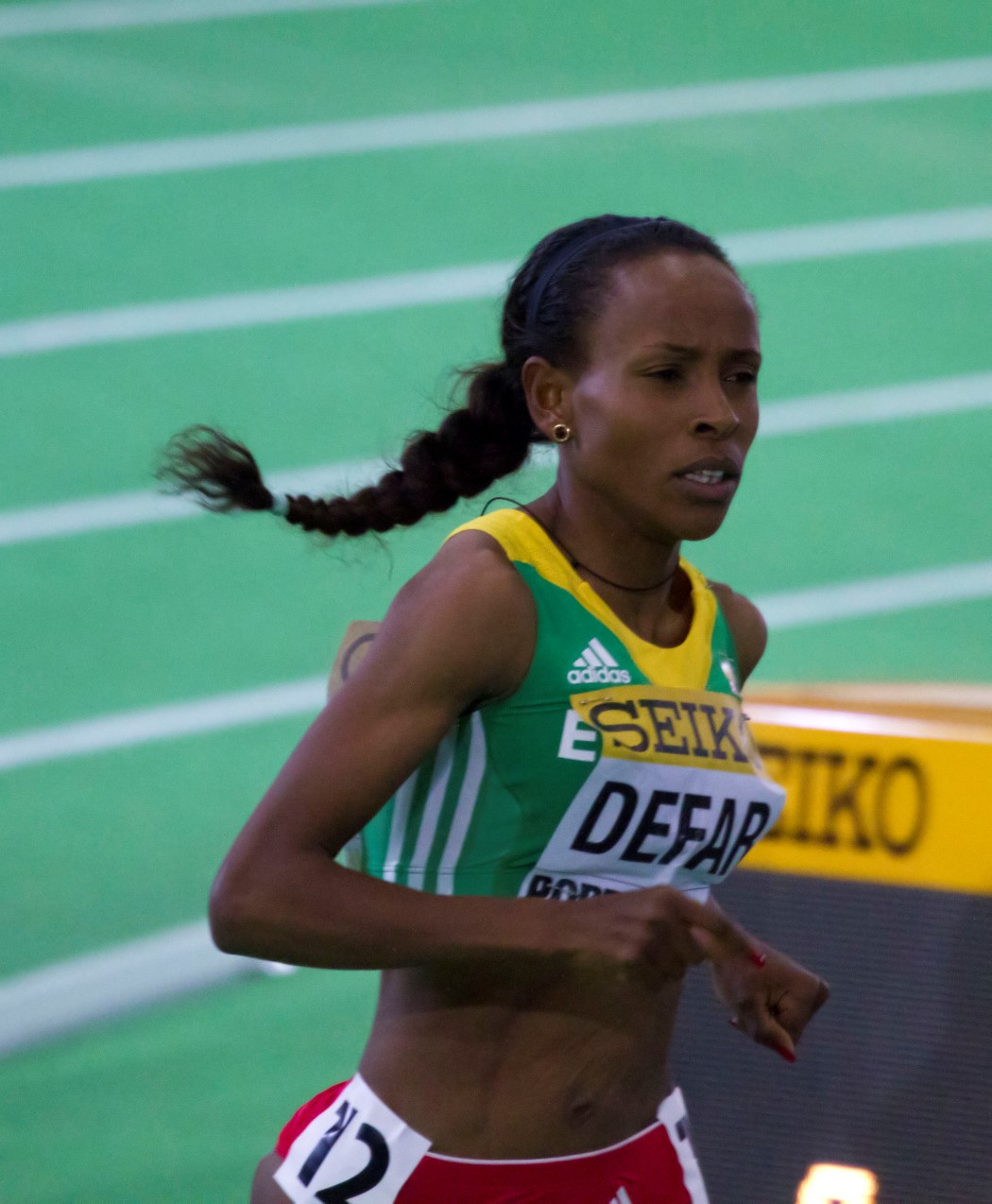 5106 defar 3000m